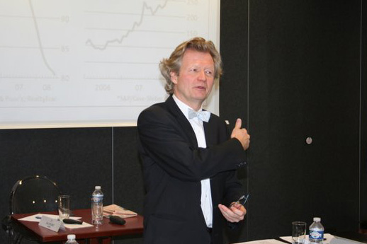 Eric Pichet lors d'une intervention pendant un séminaire